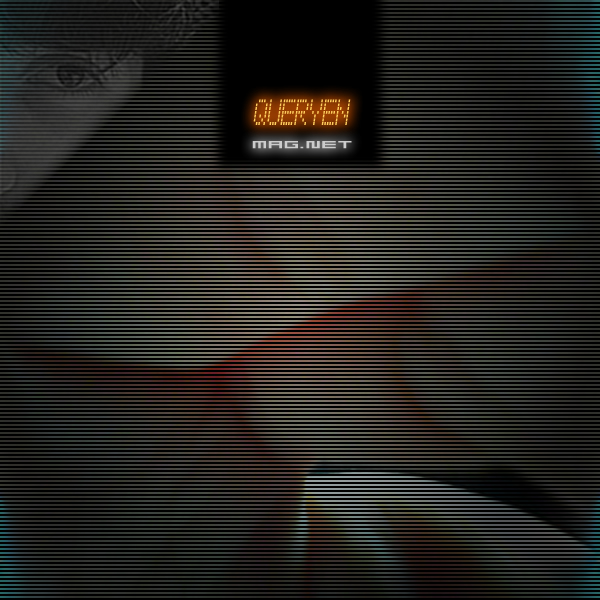 Obal albumu „ “, 2008.